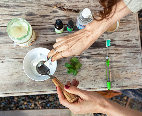 Mostramos la realización de una mascarilla facial natural hecha con aceite de coco orgánico.